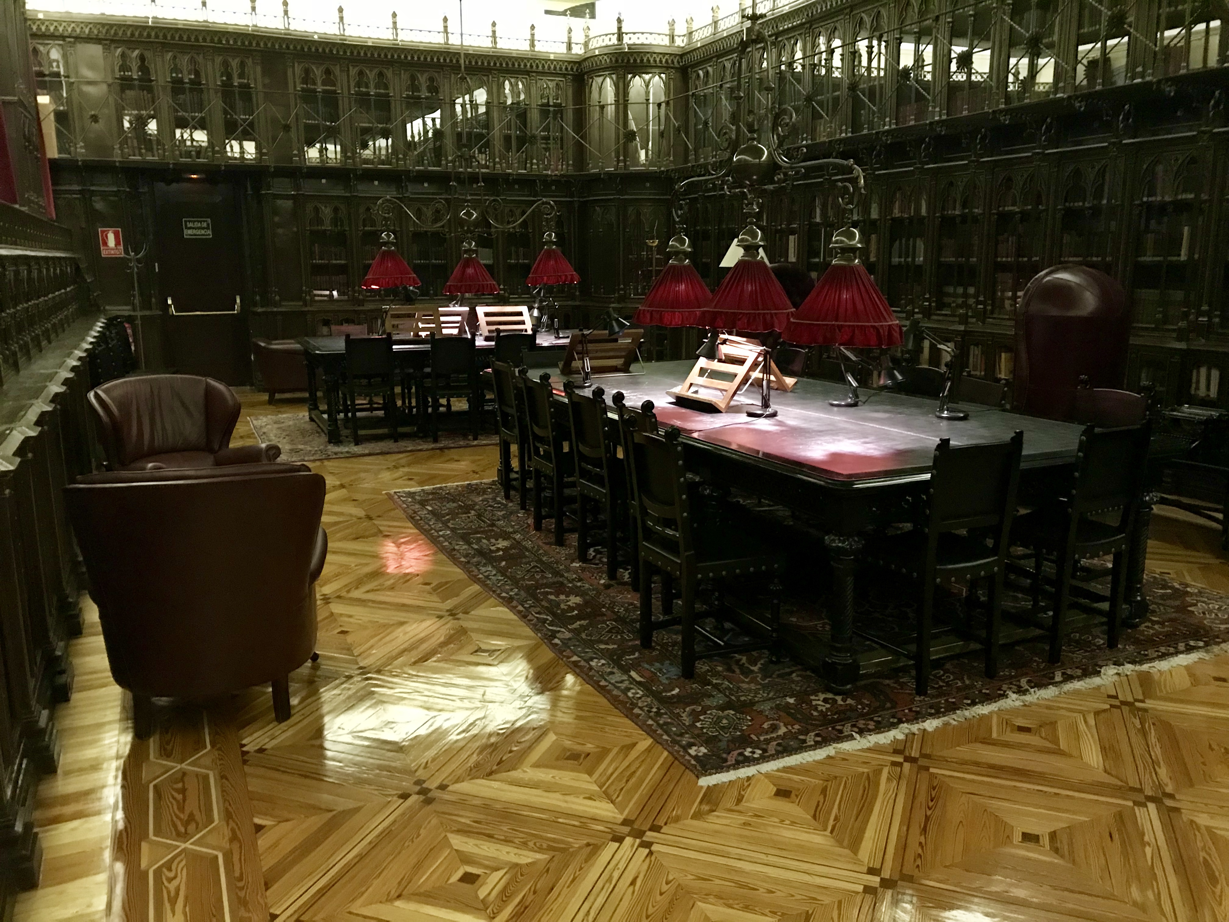 Biblioteca Gótica, Casino de Madrid